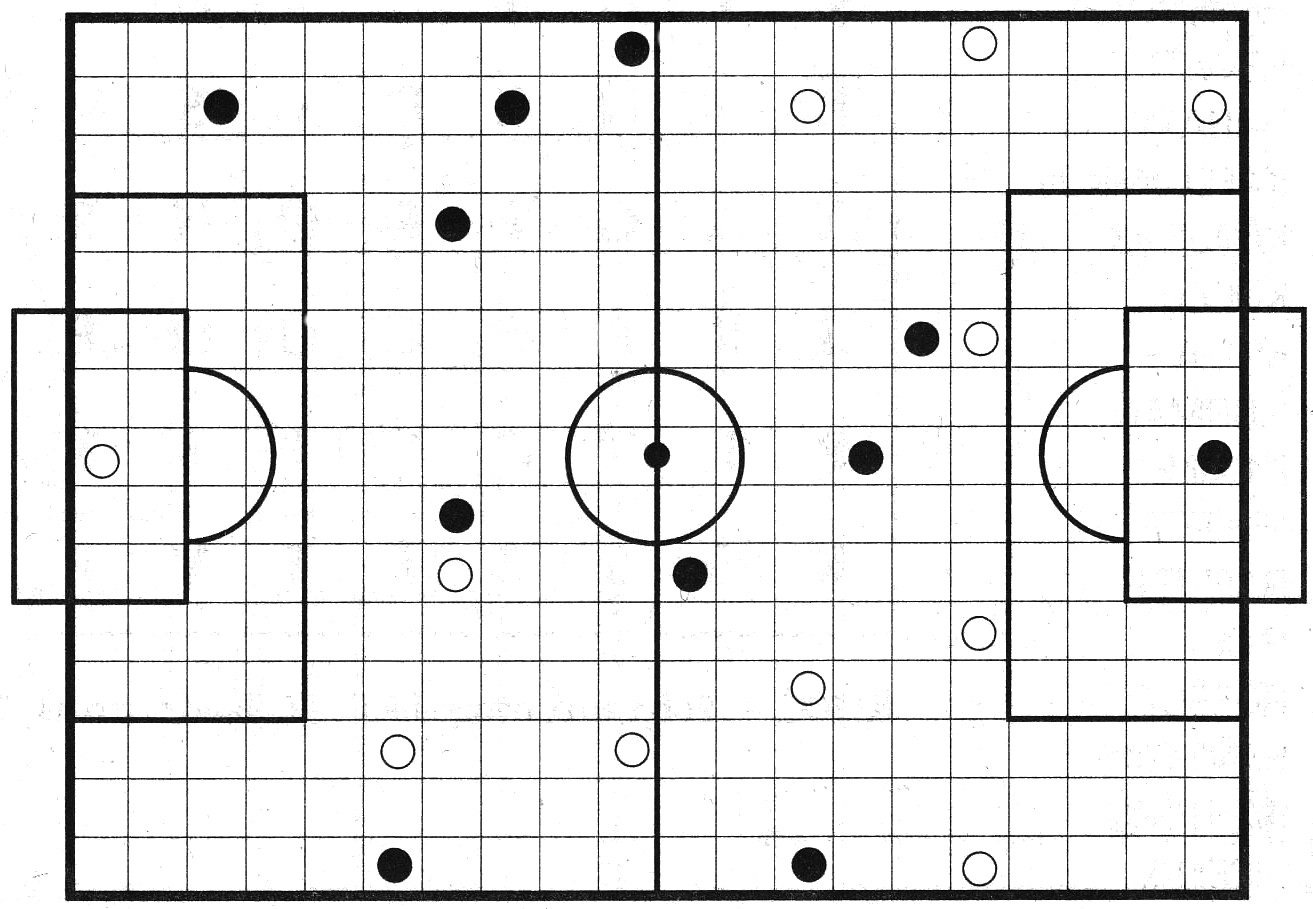 Lik za slikovnu zagonetku nogometaljku